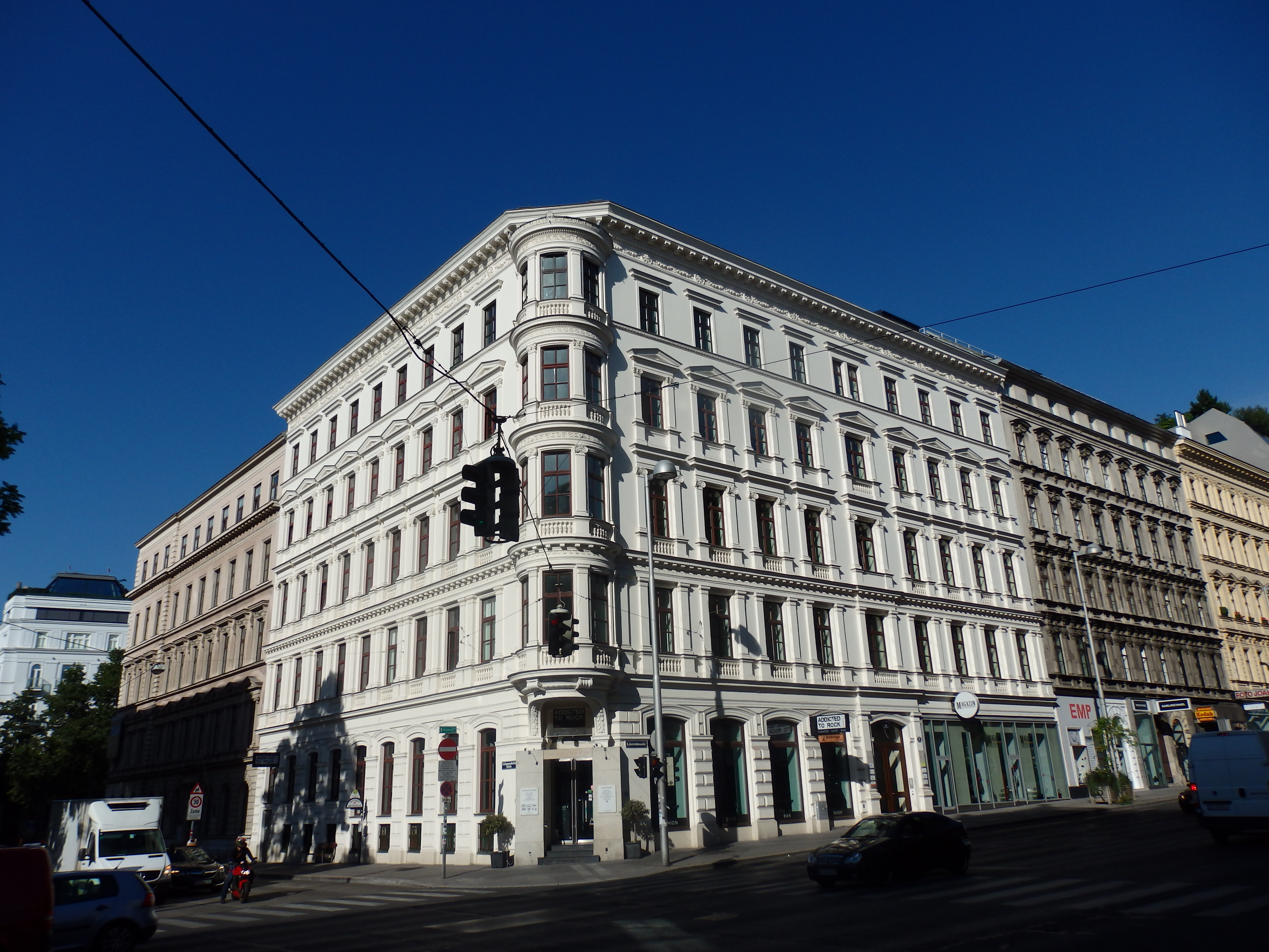 Haus (1868) von Anton Baumgartner, Getreidemarkt 11, Wien-Mariahilf